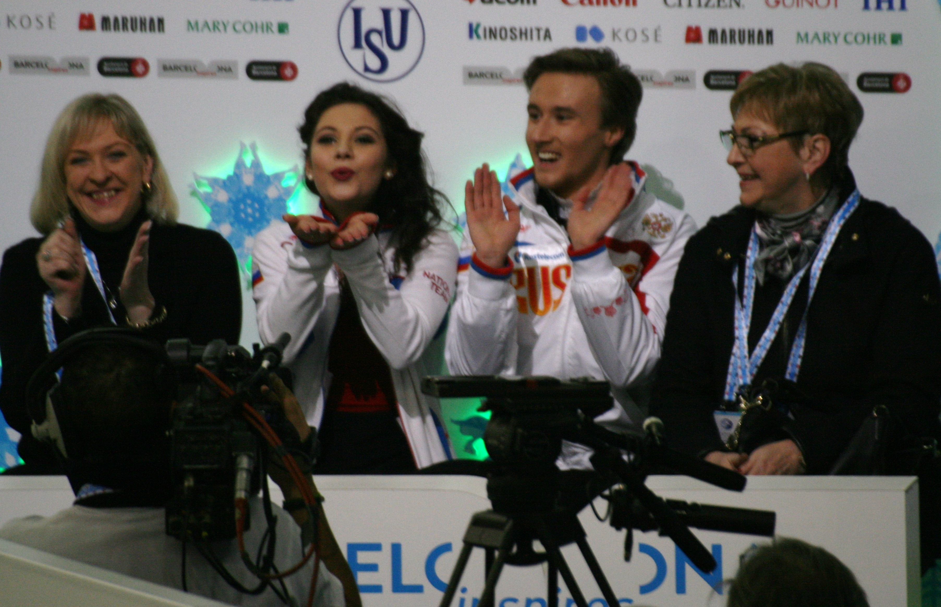 Елена Ильиных, Руслан Жиганшин, Елена Кустарова и Светлана Алексеева на финале Гран-при по фигурному катанию 2014-2015